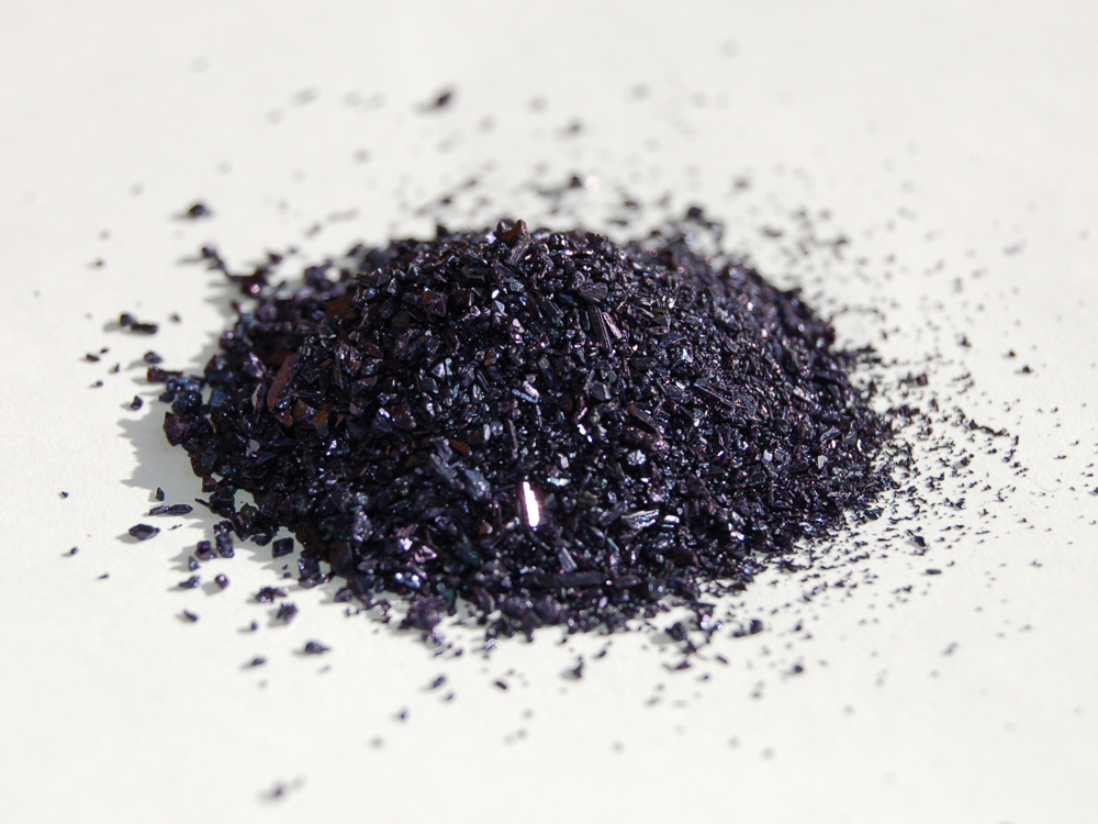 Potassium permanganate sample